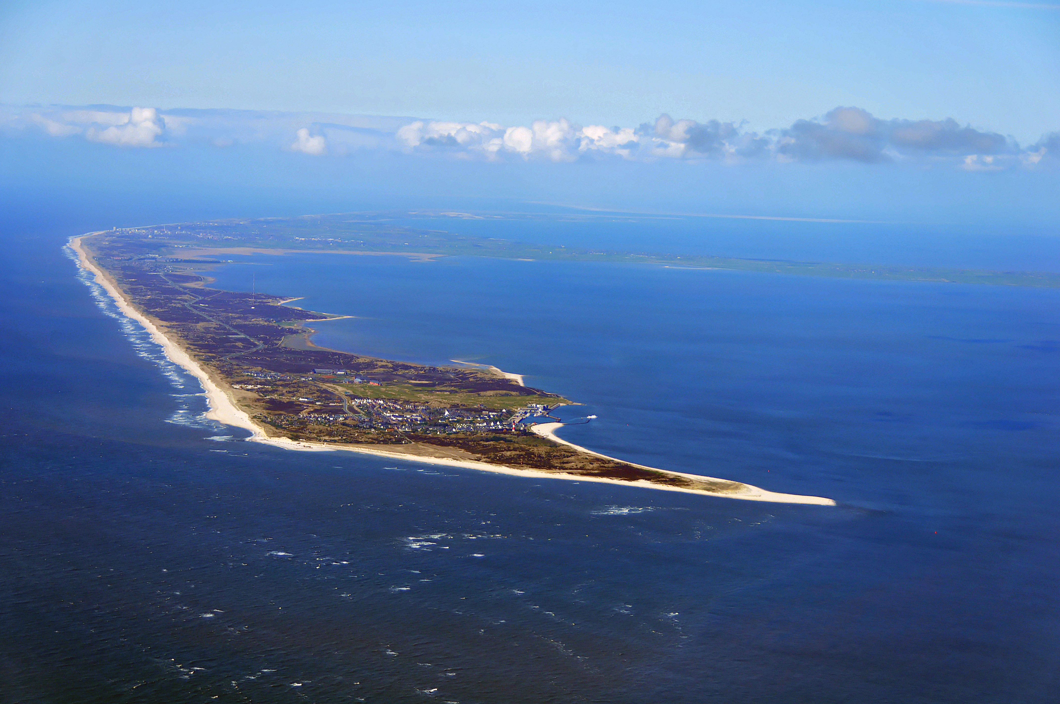 Luftbilder von der Nordseeküste 2012-05: Sylt